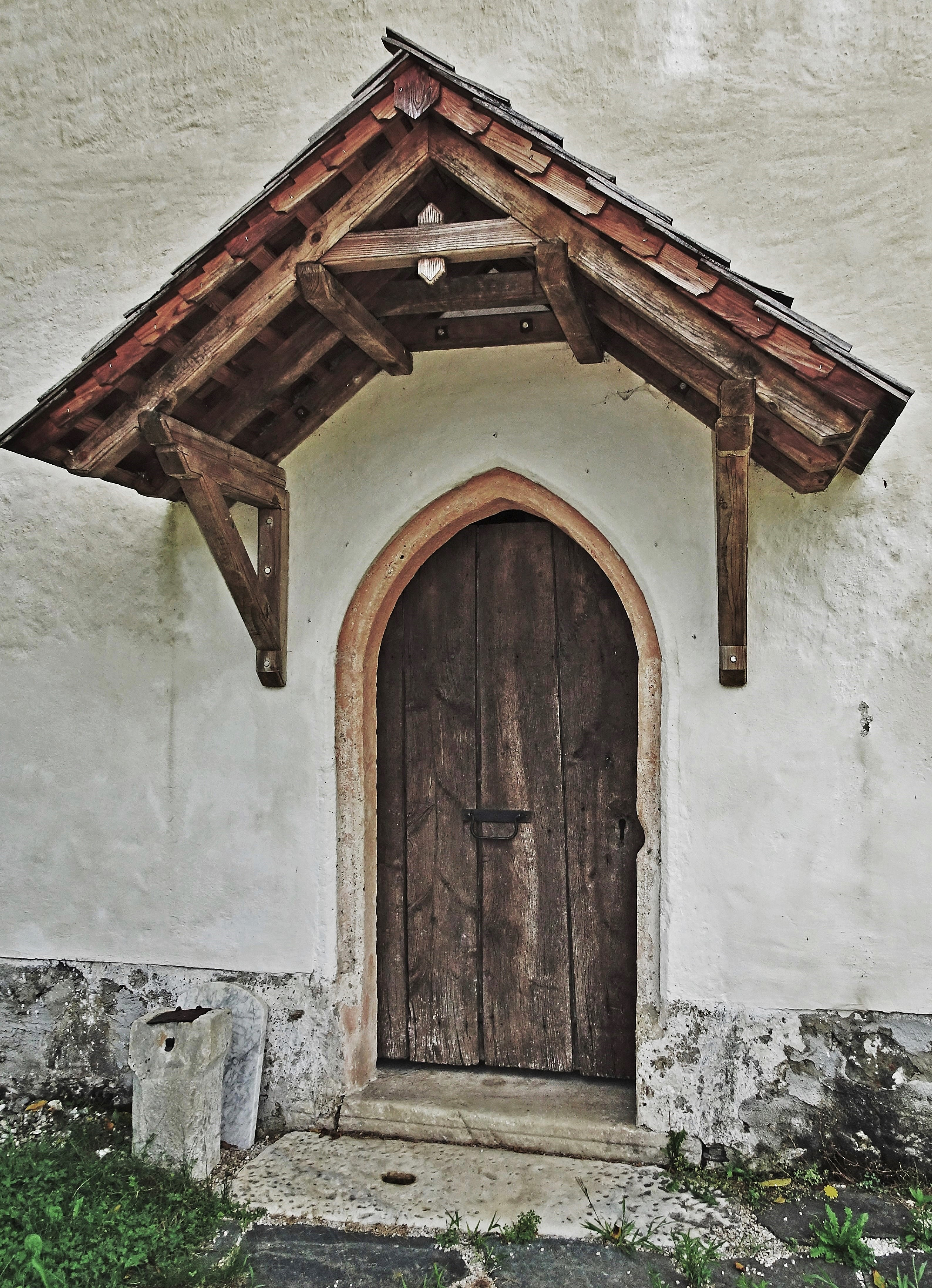 Kath. Filialkirche Hl. Laurentius Flatschach, Portal